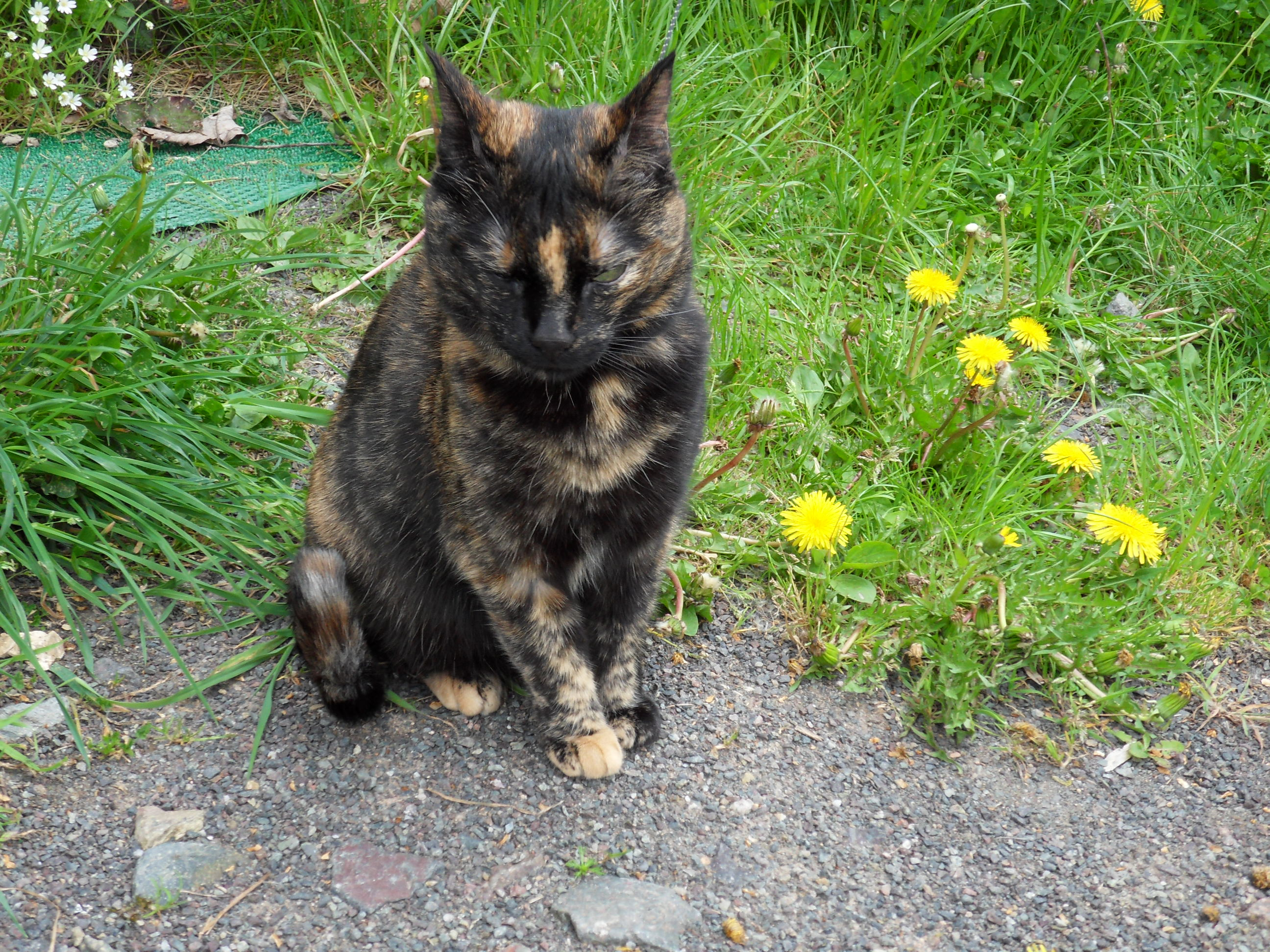 Chatte à la robe écaille de tortue